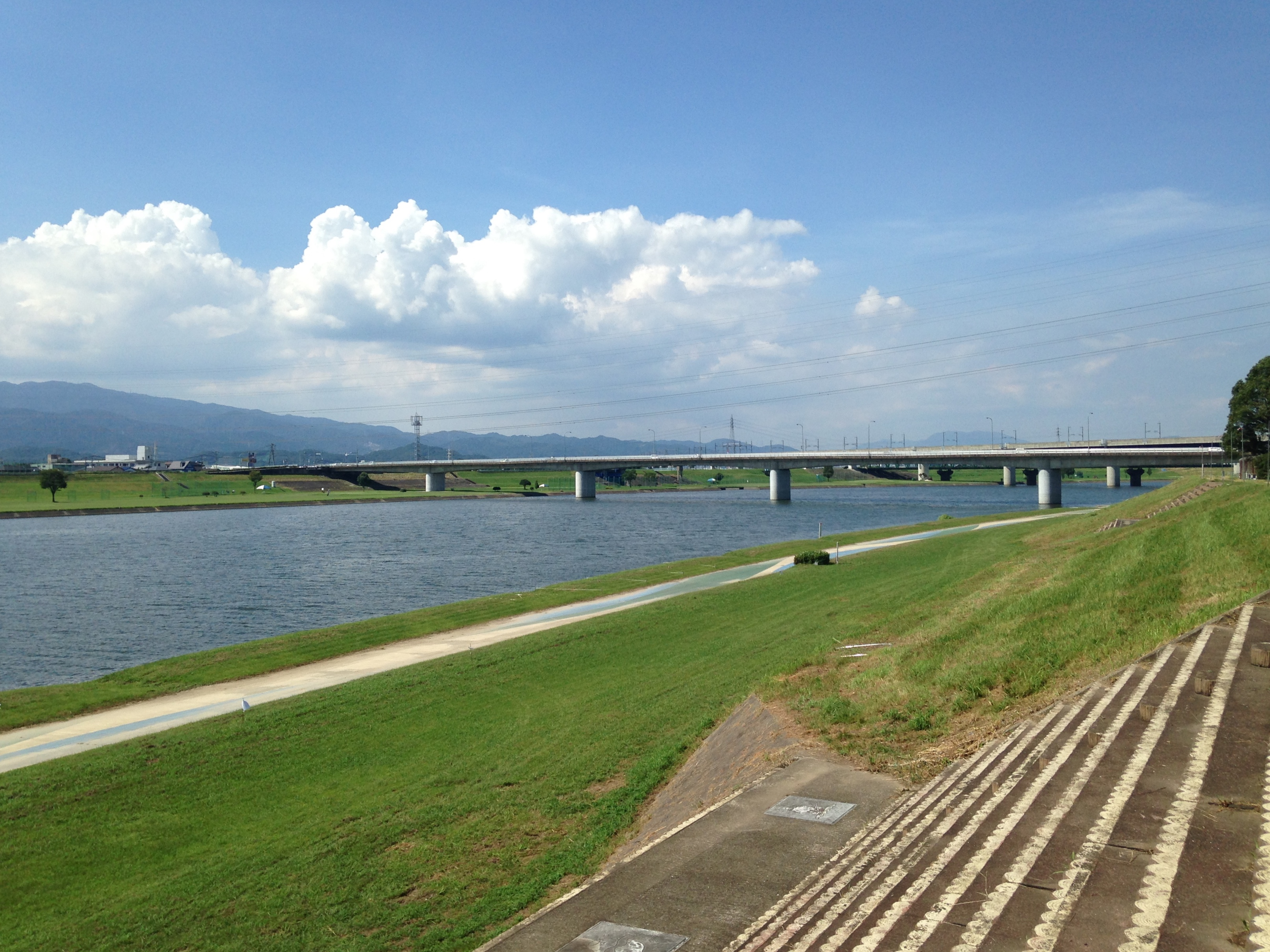 筑後川に架かる長門石橋と九州新幹線・鹿児島本線